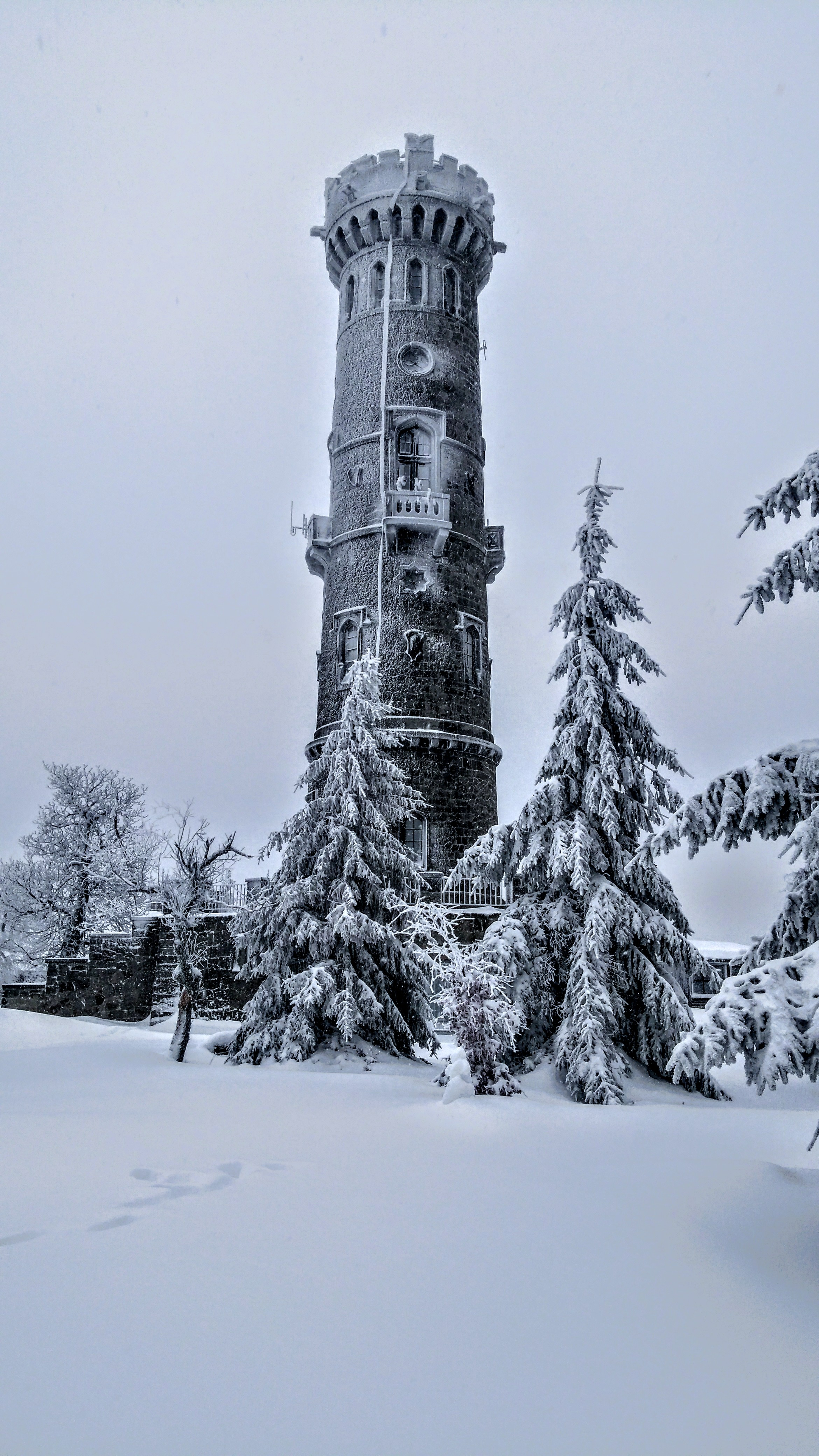 Rozhledna.